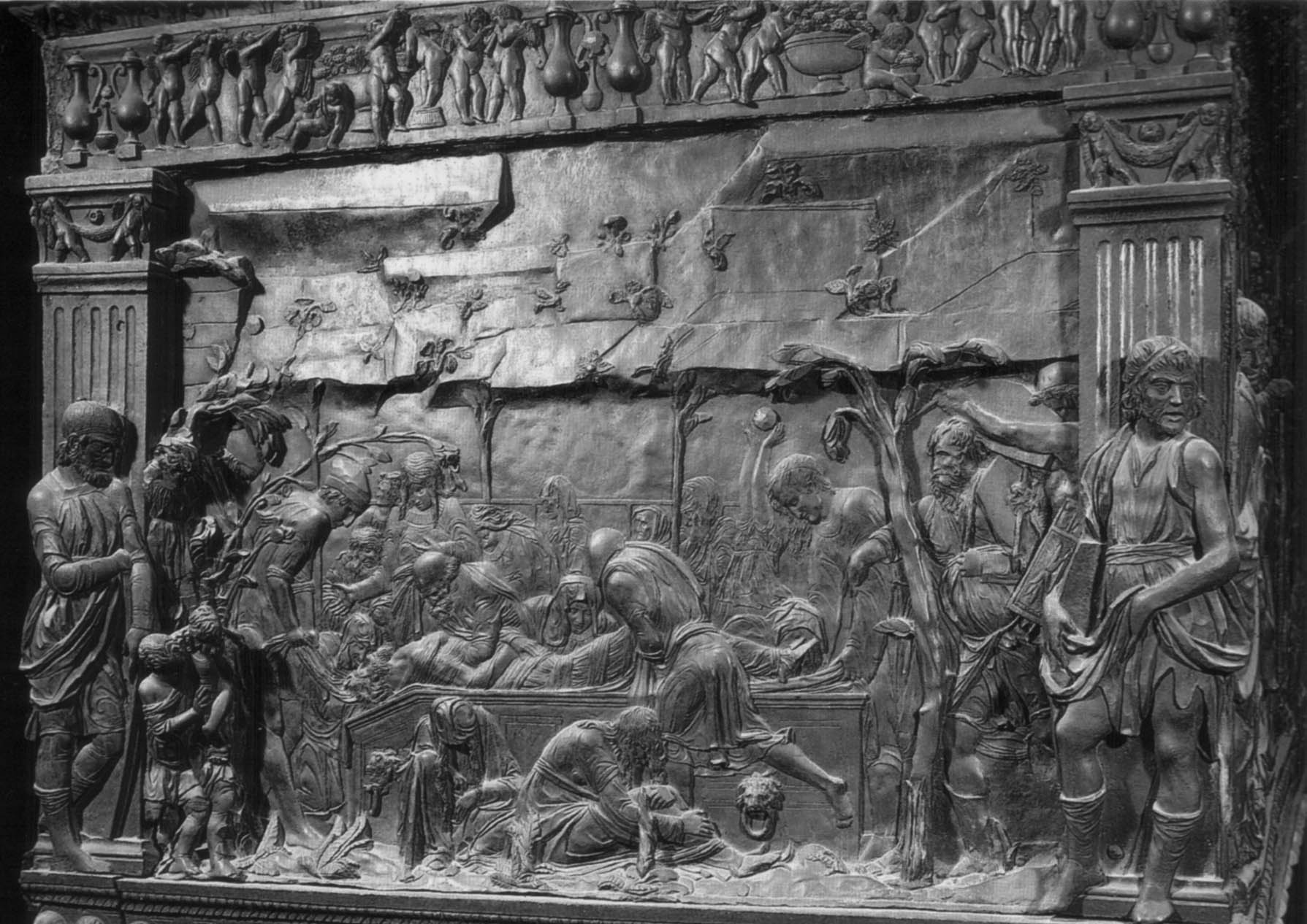 Il Pulpito della Passione, in San Lorenzo a Firenze, opera di Donatello. Dettaglio: Sepoltura. Fotografia Alinari, 1852.